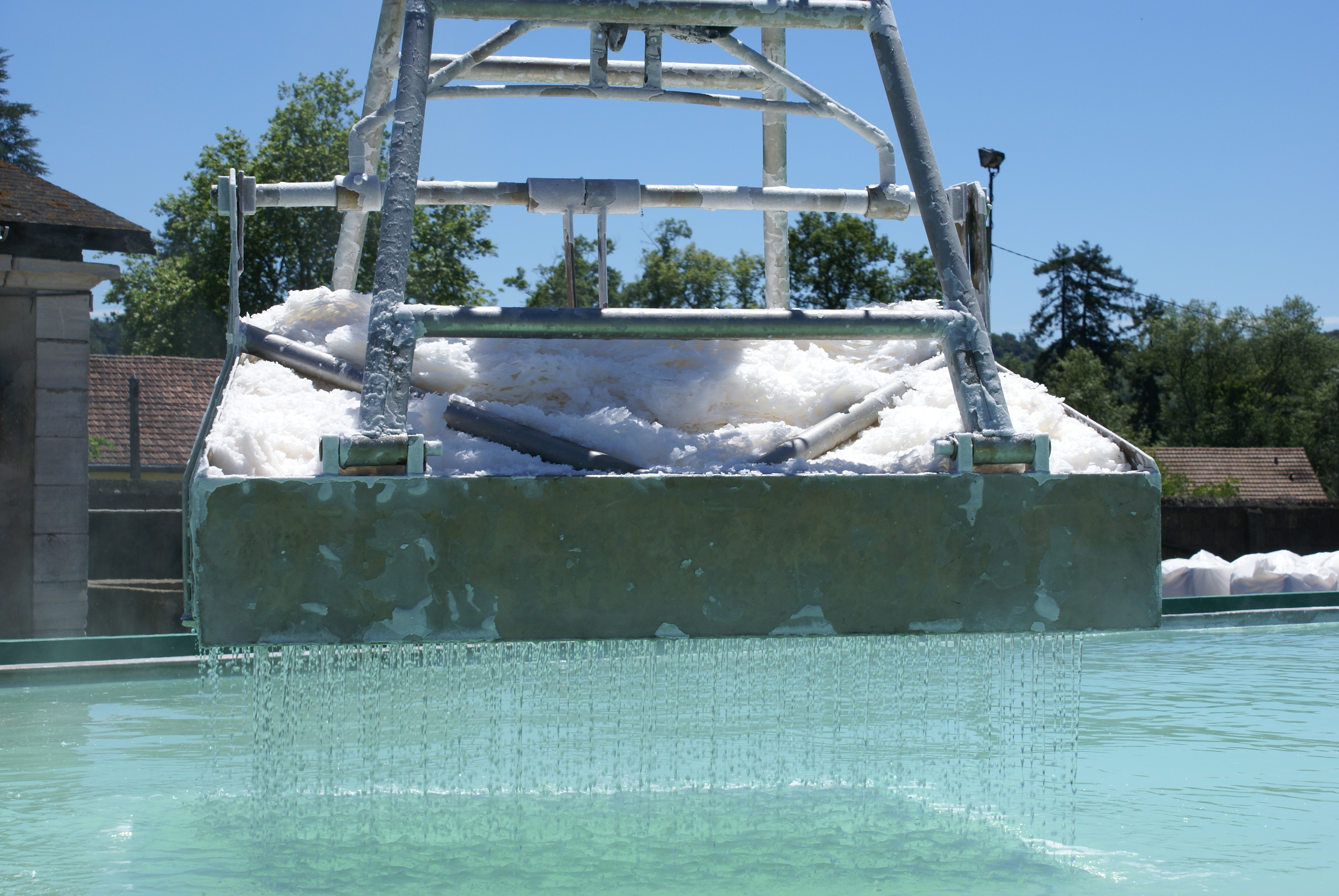 Extraction de l' "or blanc", le sel de Salies-de-Béarn